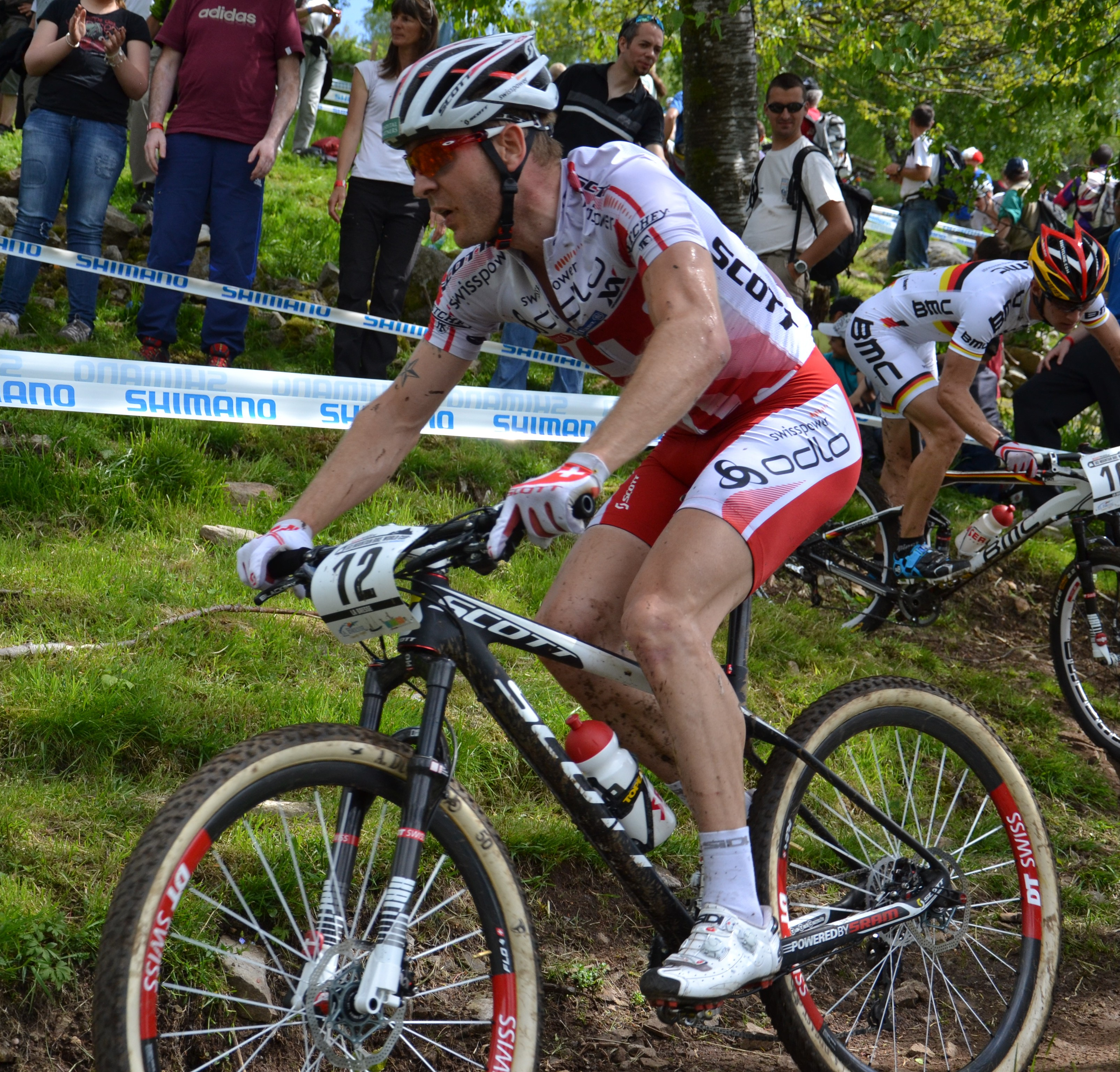 Florian Vogel lors de la 4e manche de la coupe du monde UCI de VTT 2012 à La Bresse (FRA).